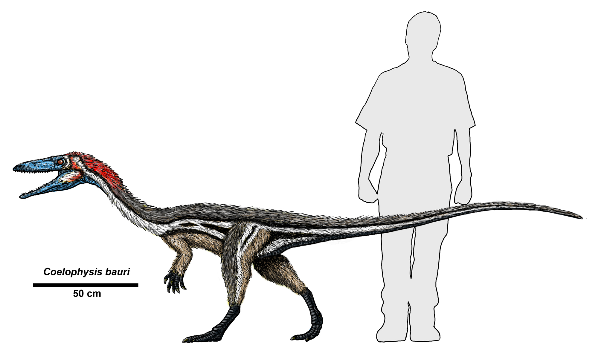 Credit Dr. Jeff Martz/NPS